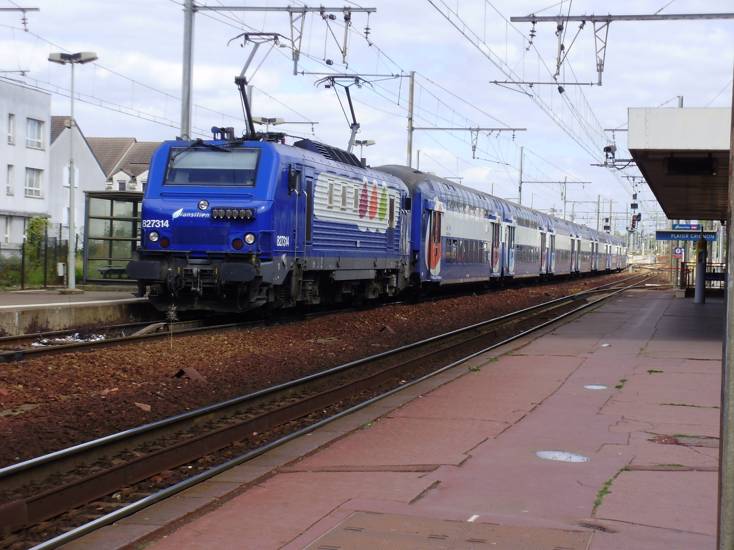 Gare de Plaisir - Grignon, à Plaisir, Yvelines, France : locomotive BB 27314 poussant une rame de voitures de banlieue à deux niveaux en attente de départ vers Paris-Montparnasse